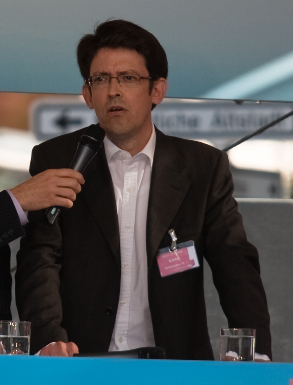 Christian Kleiminger bei einer Wahlkampfveranstaltung der SPD 2009 auf dem Neuen Markt in Rostock.